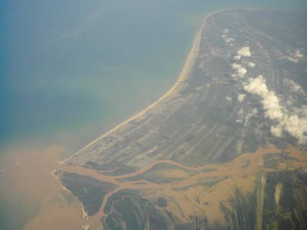 a barra de São João da Barra...a 10mil pés